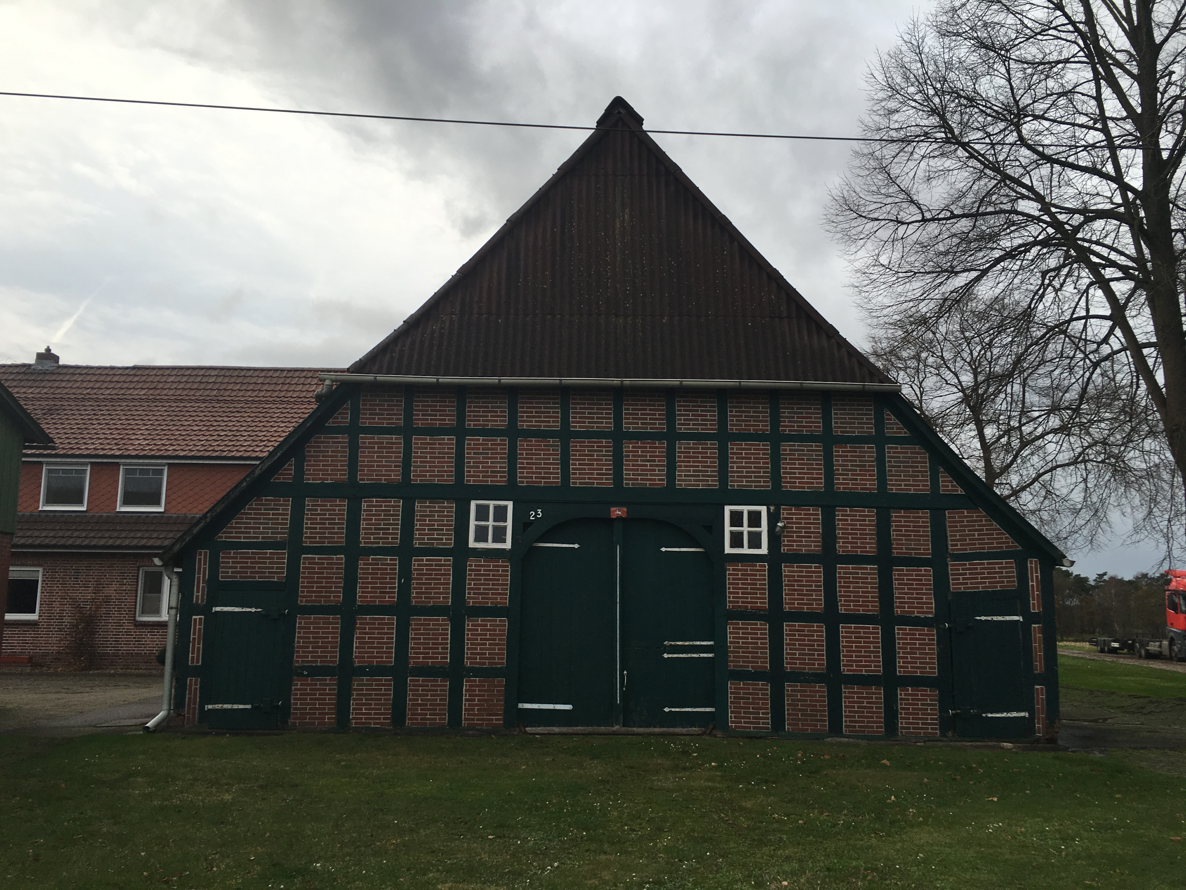 Fackwarkhuus in Poggmöhlen